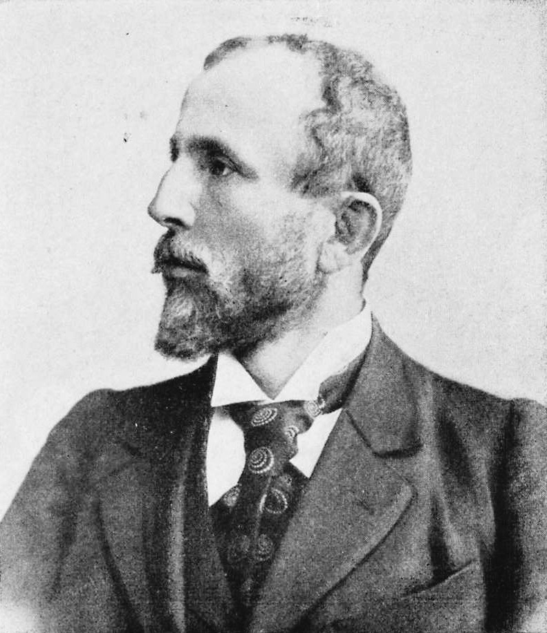 Max Baumbach (1859-1915), deutscher Bildhauer zur Zeit der Jahrhundertwende vom 19. zum 20. Jahrhundert.